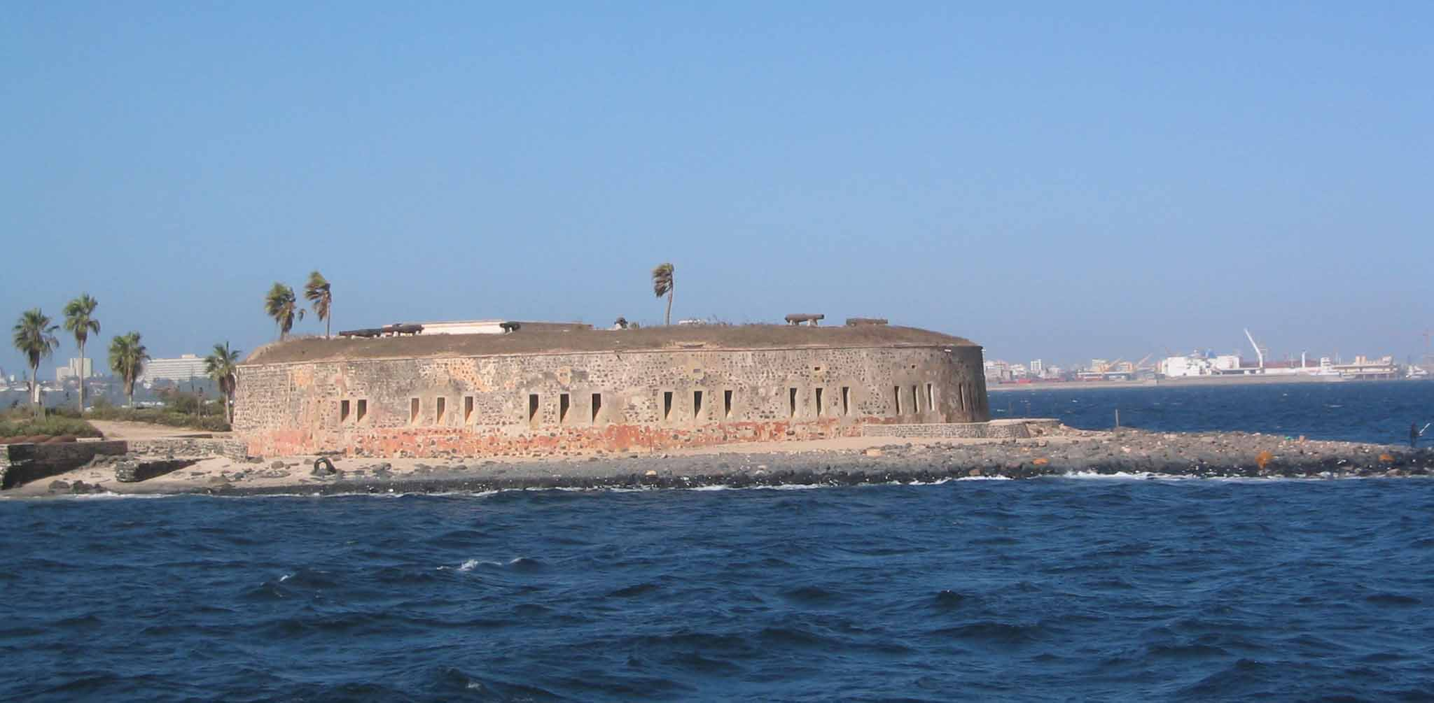 Remparts du fort d'Estrées (île de Gorée) qui abrite le Musée historique du Sénégal